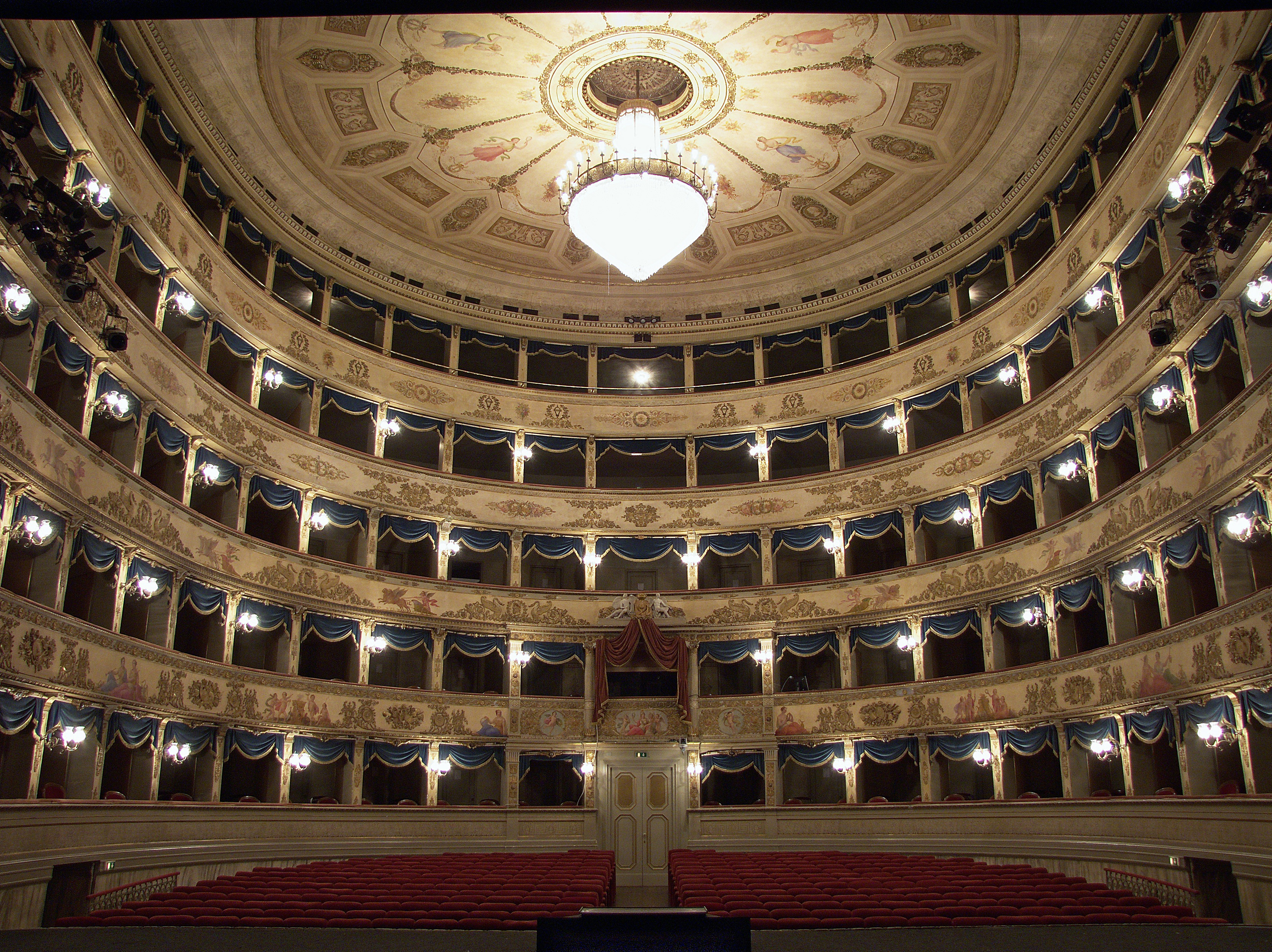 Teatro Alighieri This is a photo of a monument which is part of cultural heritage of Italy.